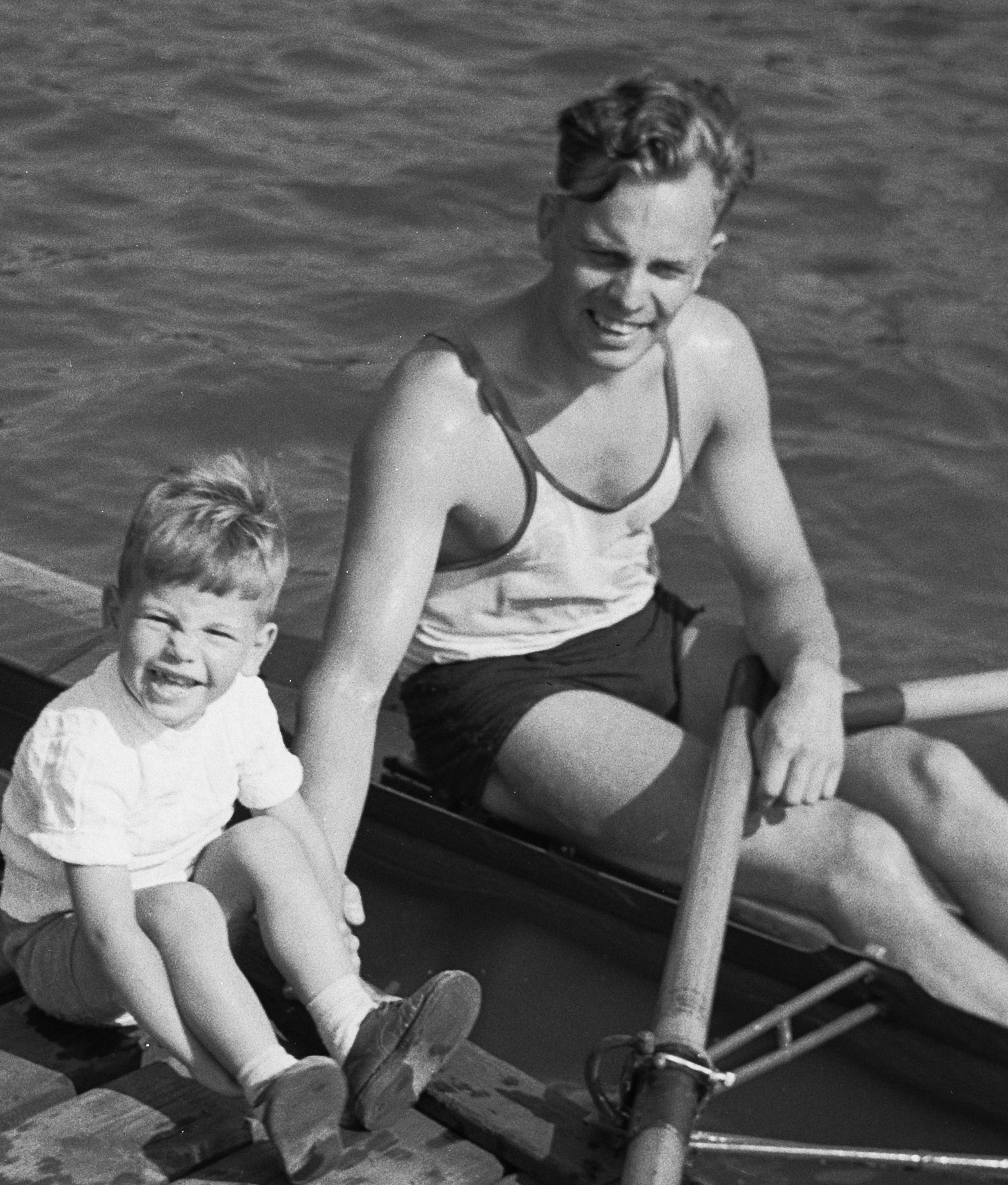 Roeiwedstrijden op de Bosbaan te Amsterdam. Skiffeur Tom Neumeier met zoontje